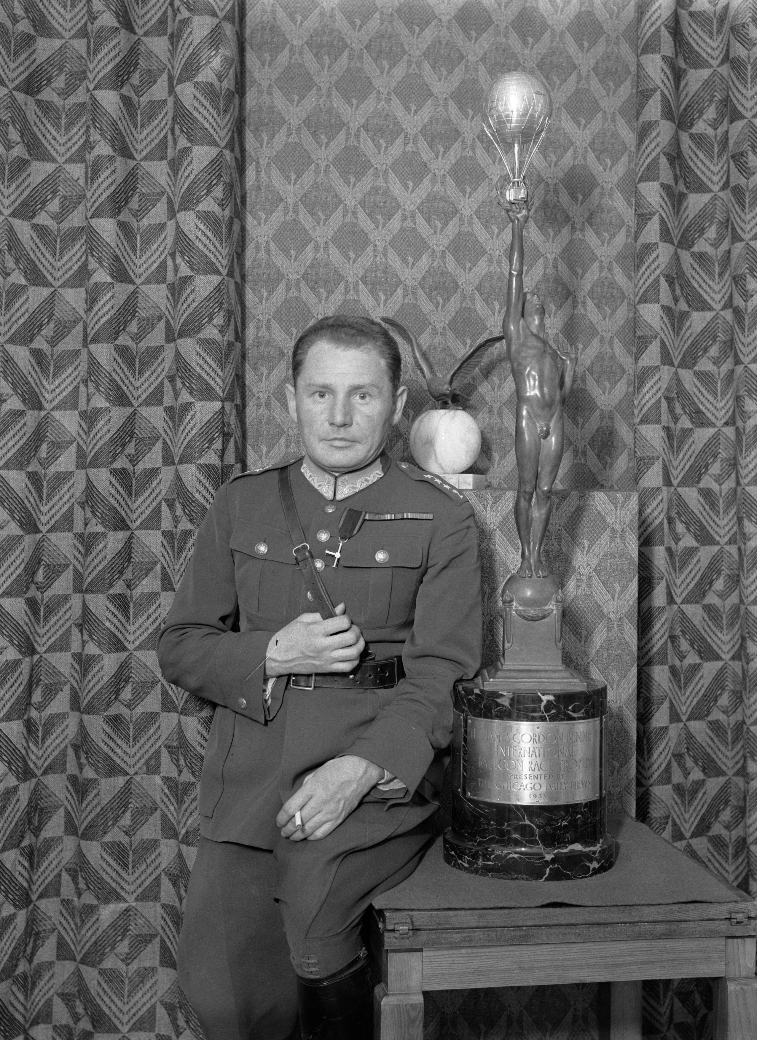 Collectie / Archief : Fotocollectie Van de Poll Reportage / Serie : Reis naar Polen Beschrijving : Warschau. Portret van de luchtmachtkapitein en ballonvaarder Franciszek Hynek (1897-1958) zittende naast de Gordon Bennett Cup Annotatie : Luchtmachtofficier Hynek heeft zich verdienstelijk gemaakt voor de Poolse luchtvaart. Als ballonvaarder vestigde hij enkele records en won samen met zijn collega Zbigneiw Burzynski enkele malen de Gordon Benett Cup. In 1934 brachten zij het Pools vluchtrecord voor luchtballonnen op 44 uur. Hynek kwam in 1958 om bij een mislukte landing met een luchtballon Datum : 1934 Locatie : Polen, Warschau Trefwoorden : ballonvaart, kapiteins, luchtmacht, militairen, sportprijzen Persoonsnaam : Hynek, Franciszek Fotograaf : Poll, Willem van de Auteursrechthebbende : Nationaal Archief Materiaalsoort : Glasnegatief Nummer archiefinventaris : bekijk toegang 2.24.14.02 Bestanddeelnummer : 190-1342